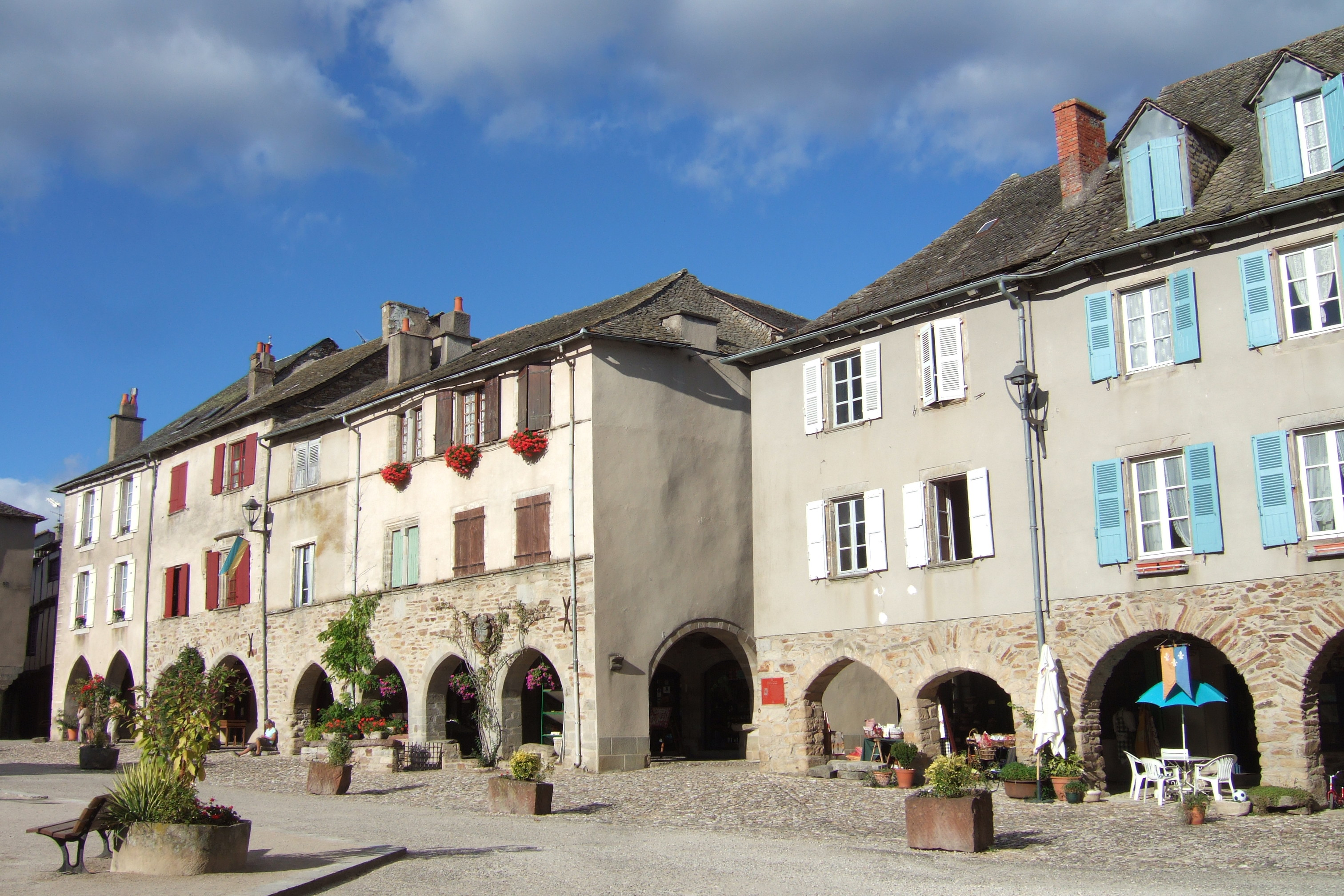 vue des facades côté ouest de la place de Sauveterre-de-Rouergue.